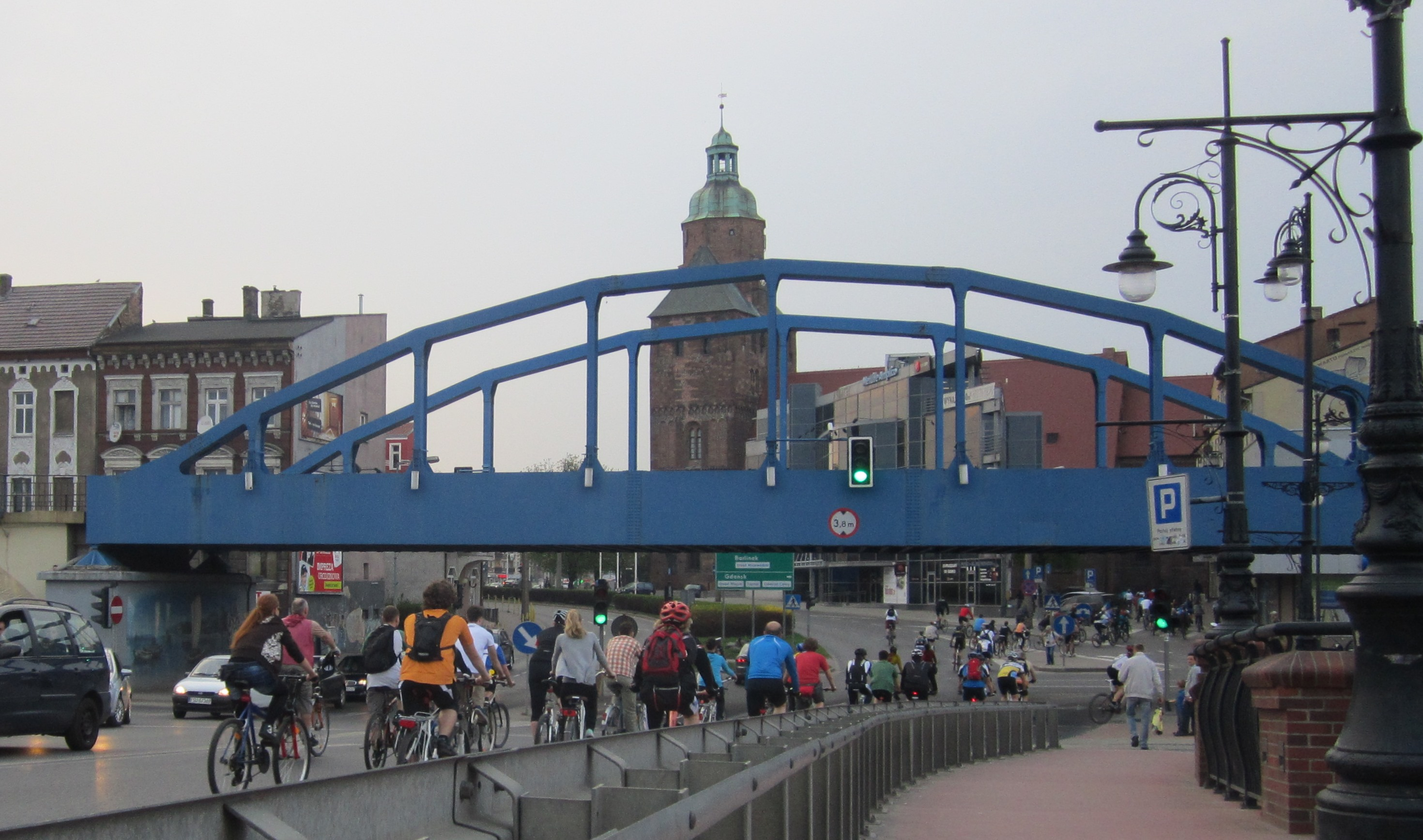 Masa krytyczna; Gorzów Wlkp.